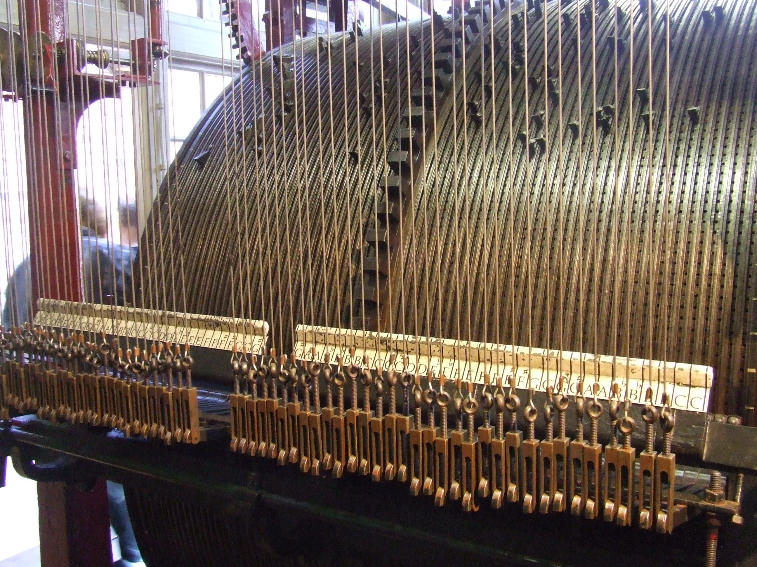 Speeltrommel van de Dom in Utrecht. De gebruikte camera is FinePix S5600.